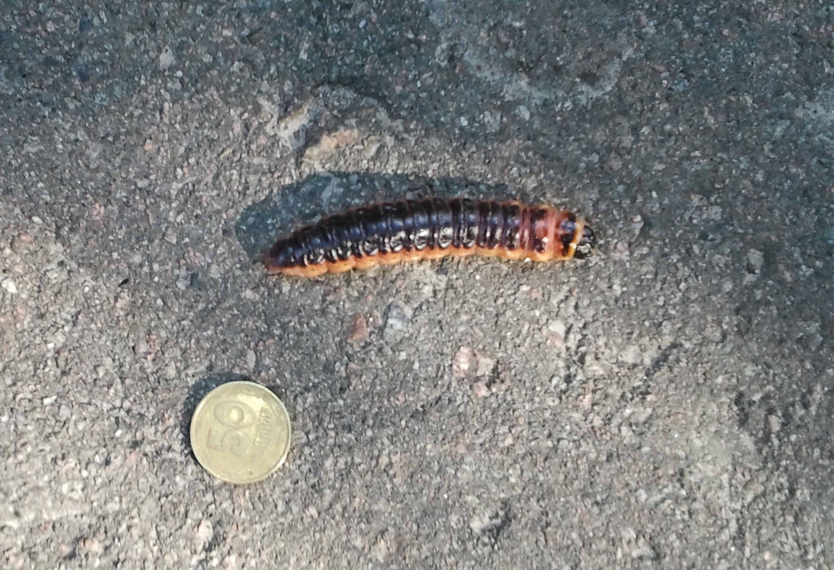 Червиця пахуча: Червиця пахуча, гусениця